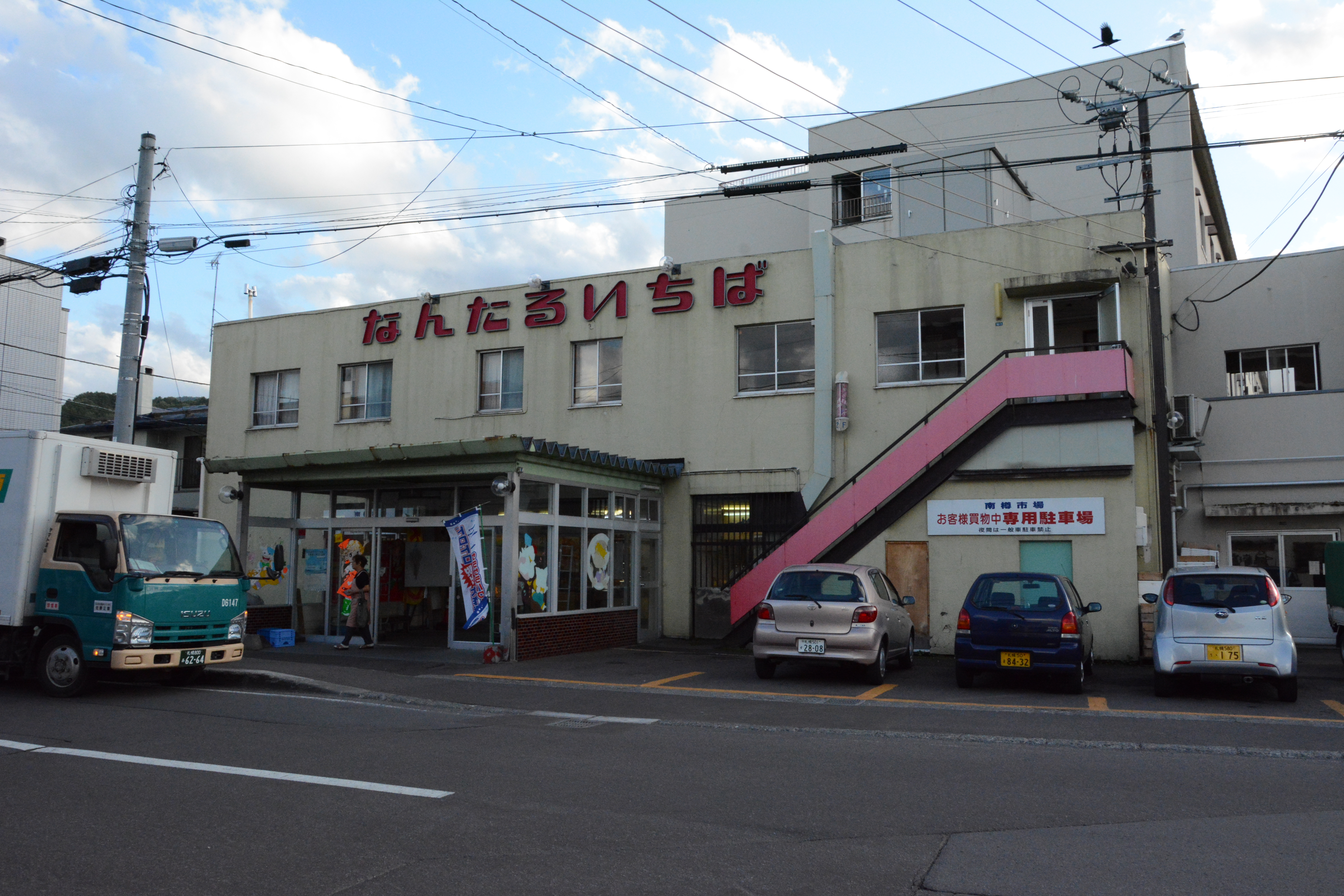 南樽市場外観(裏手)